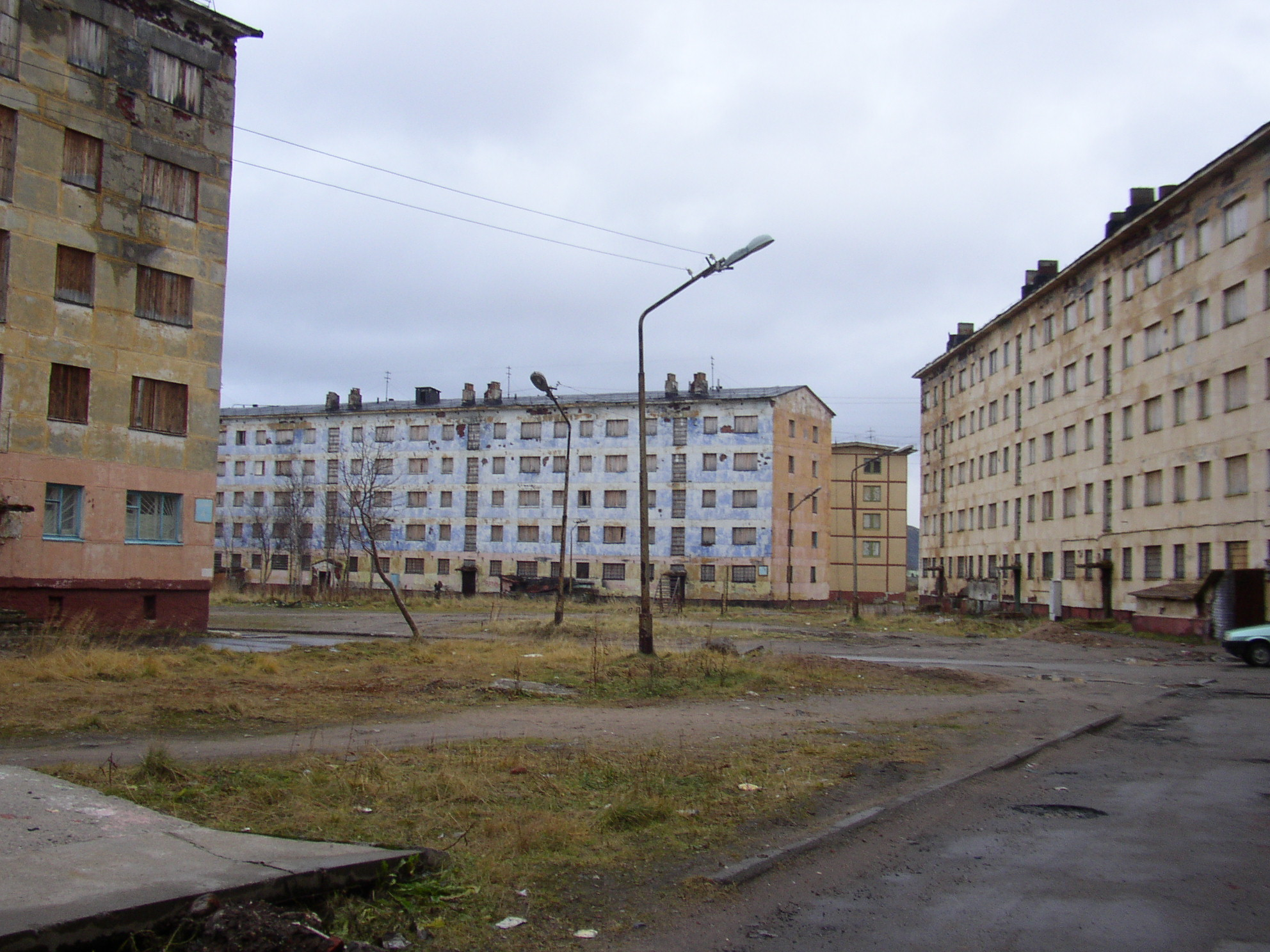 Дома в Заозерске